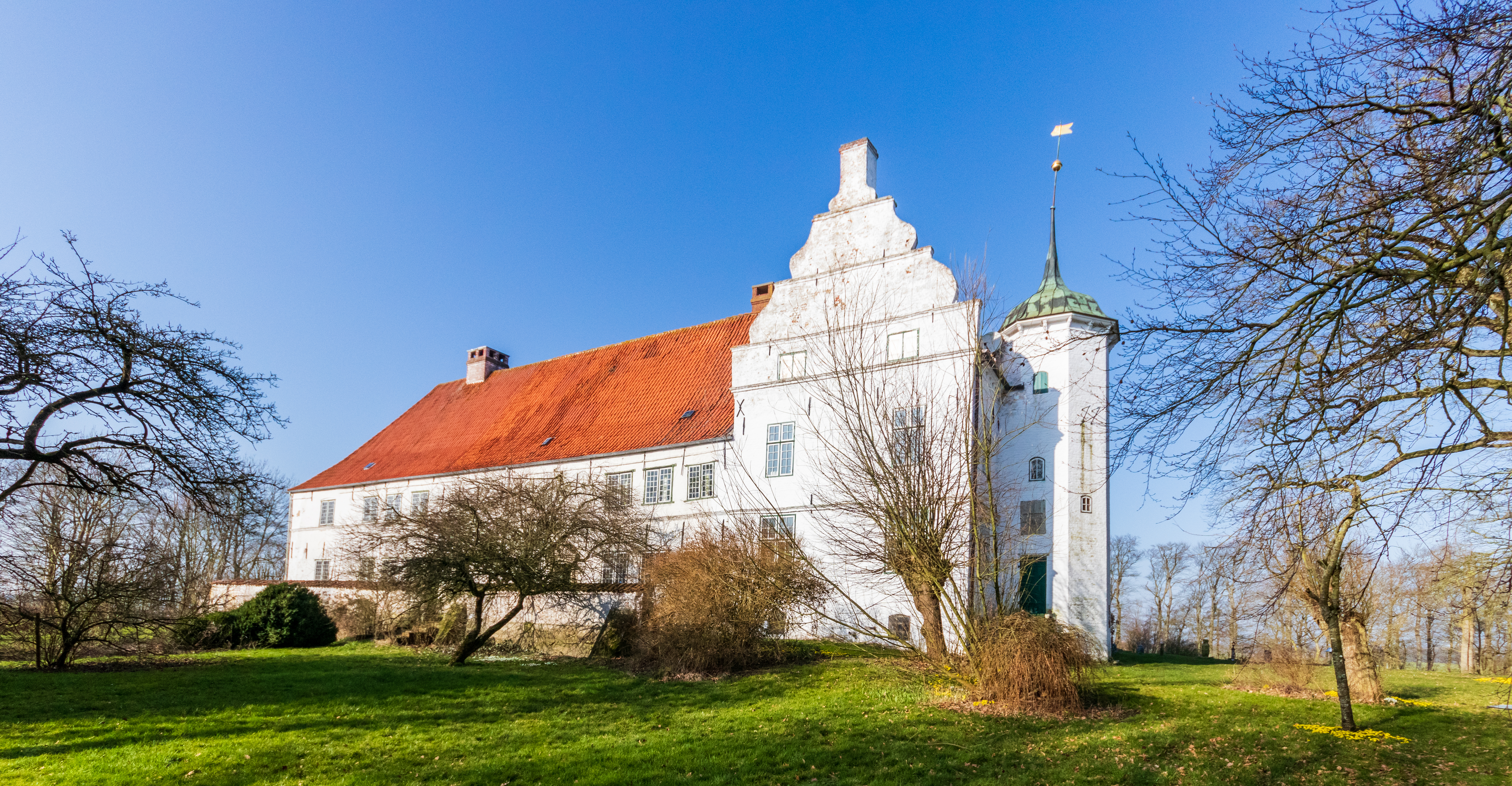 Herrenhaus Hoyerswort - Gartenseite